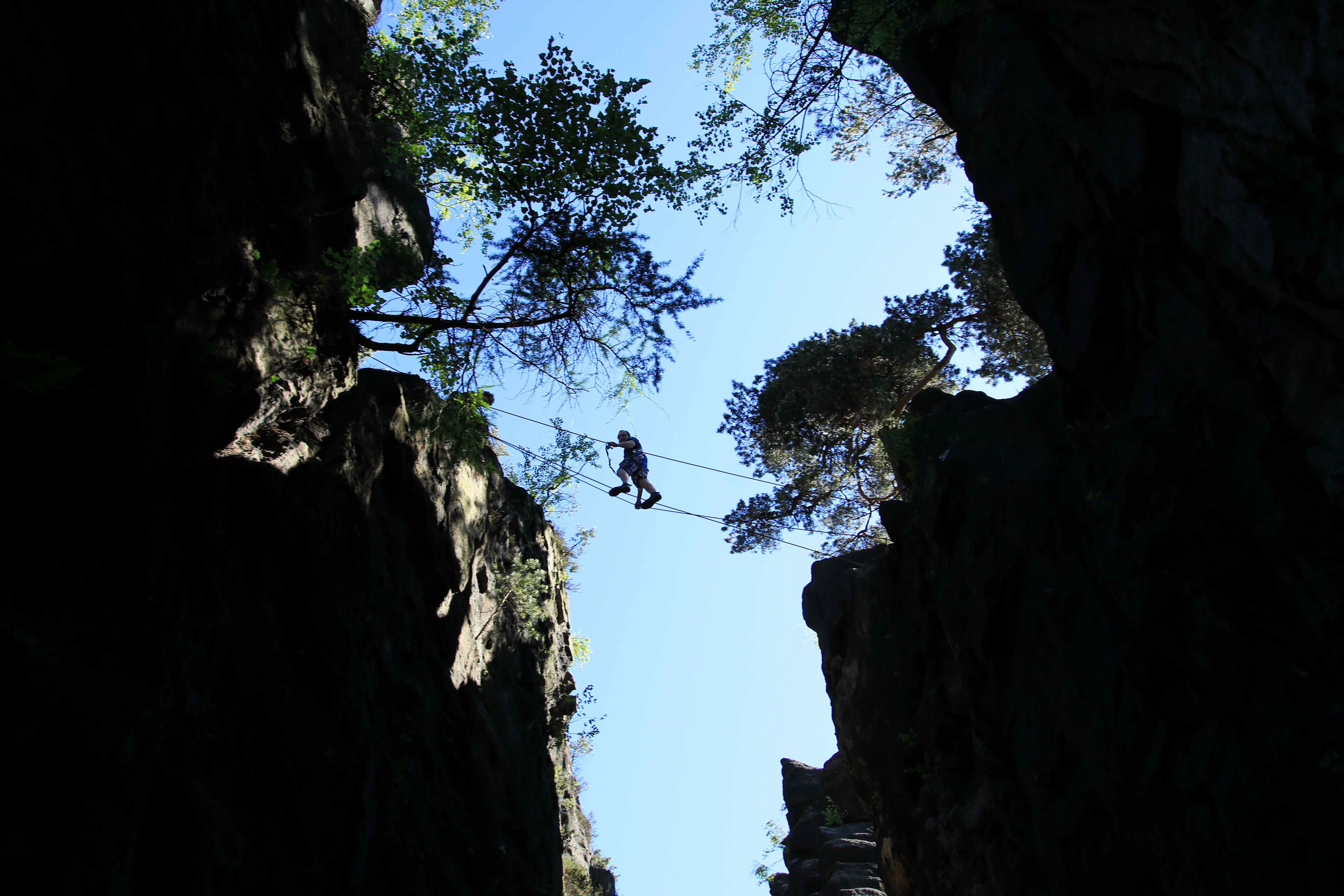 Blick von der Basaltgang am Nonnenfelsen bei Jonsdorf im Naturpark Zittauer Gebirge. Sachsen.